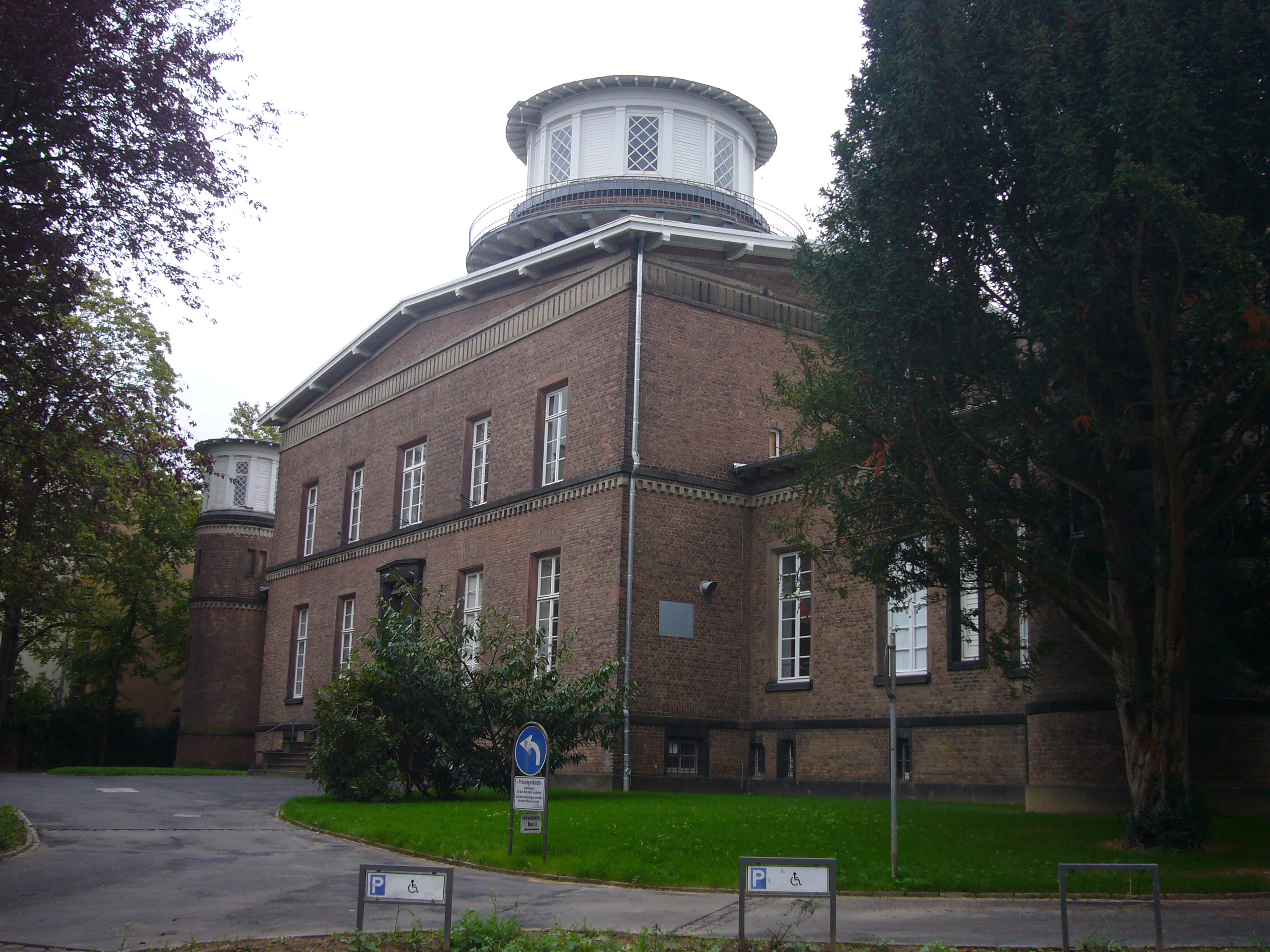 Die ehemalige Sternwarte, Nr. A163 der Bonner Denkmalliste